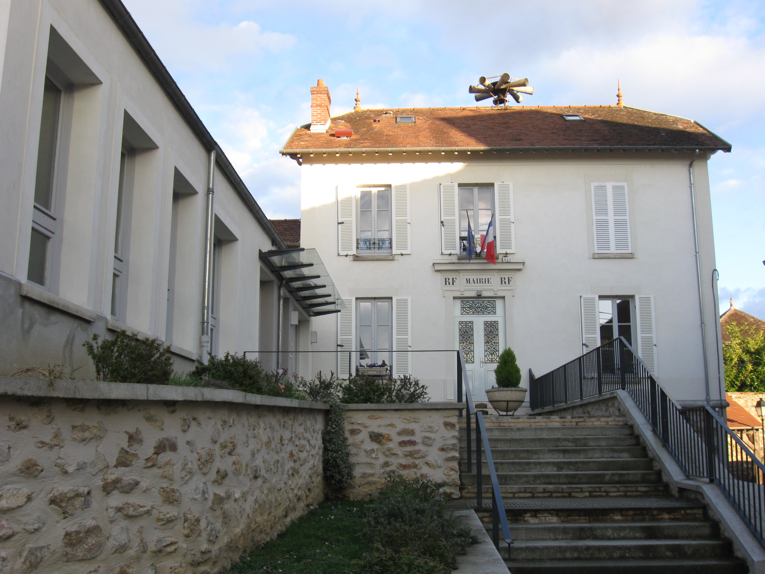 Mairie-école de Boissise-la-Bertrand. (Seine-et-Marne, région Île-de-France).